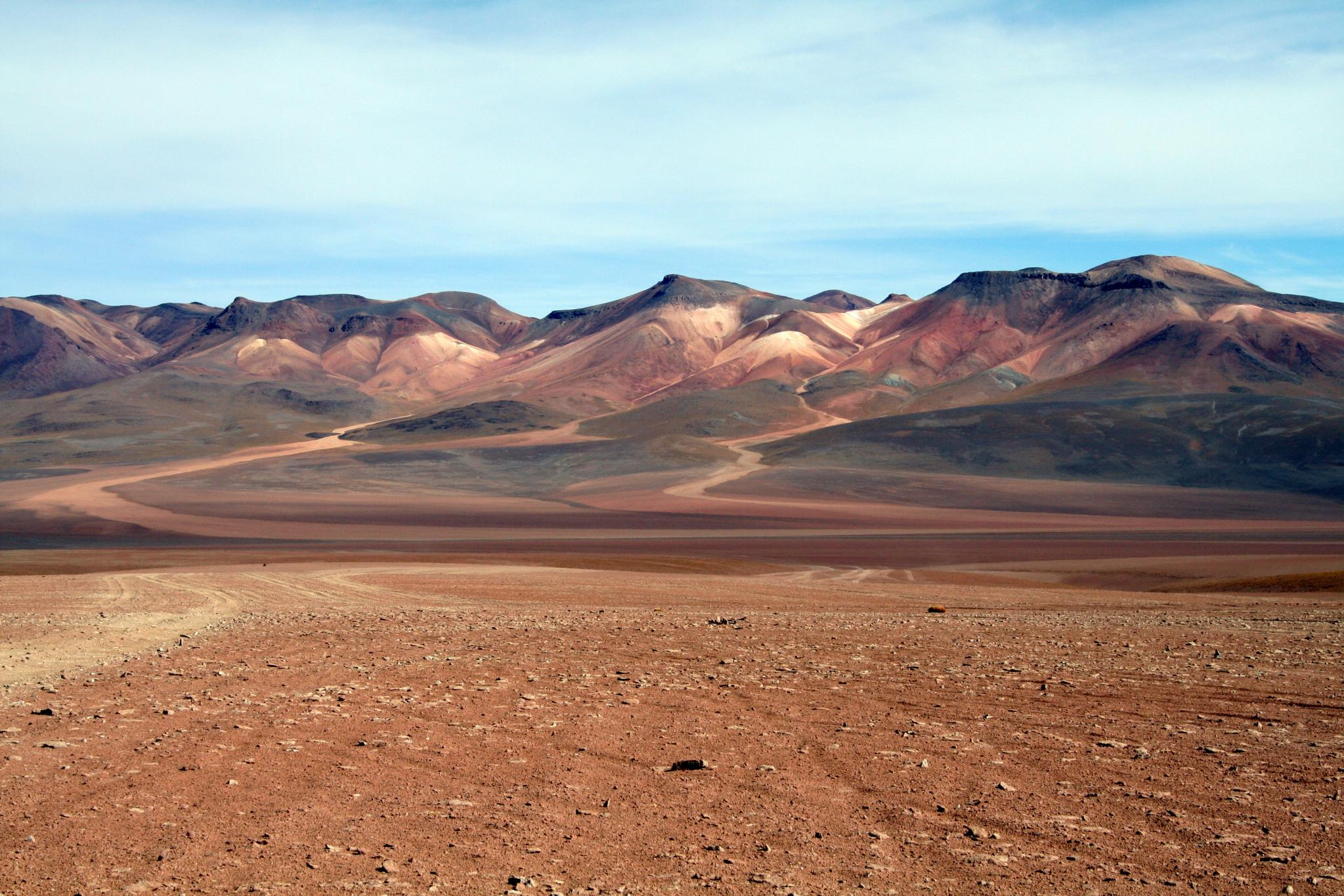 desierto Salvador Dalí en el departamento de Potosí al sur de Bolivia